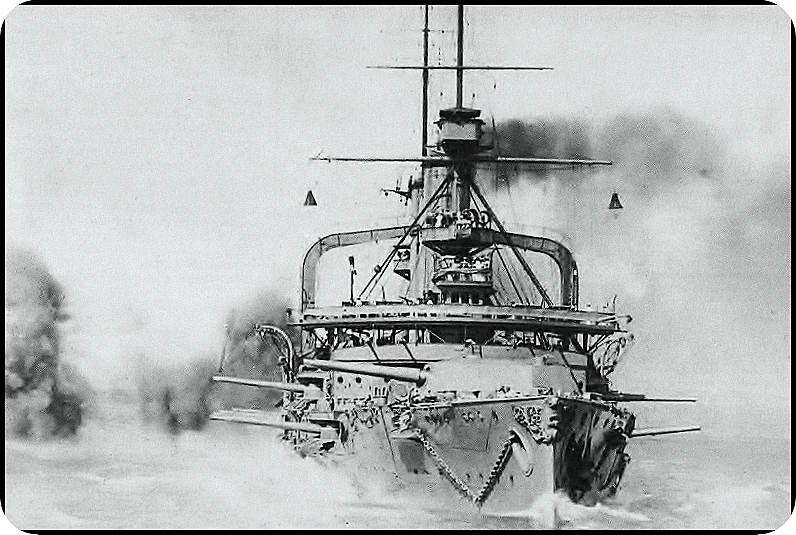 HMS Swiftsure (1903) prácticas de la artillería en una Base de las Indias Orientales en el verano de 1913